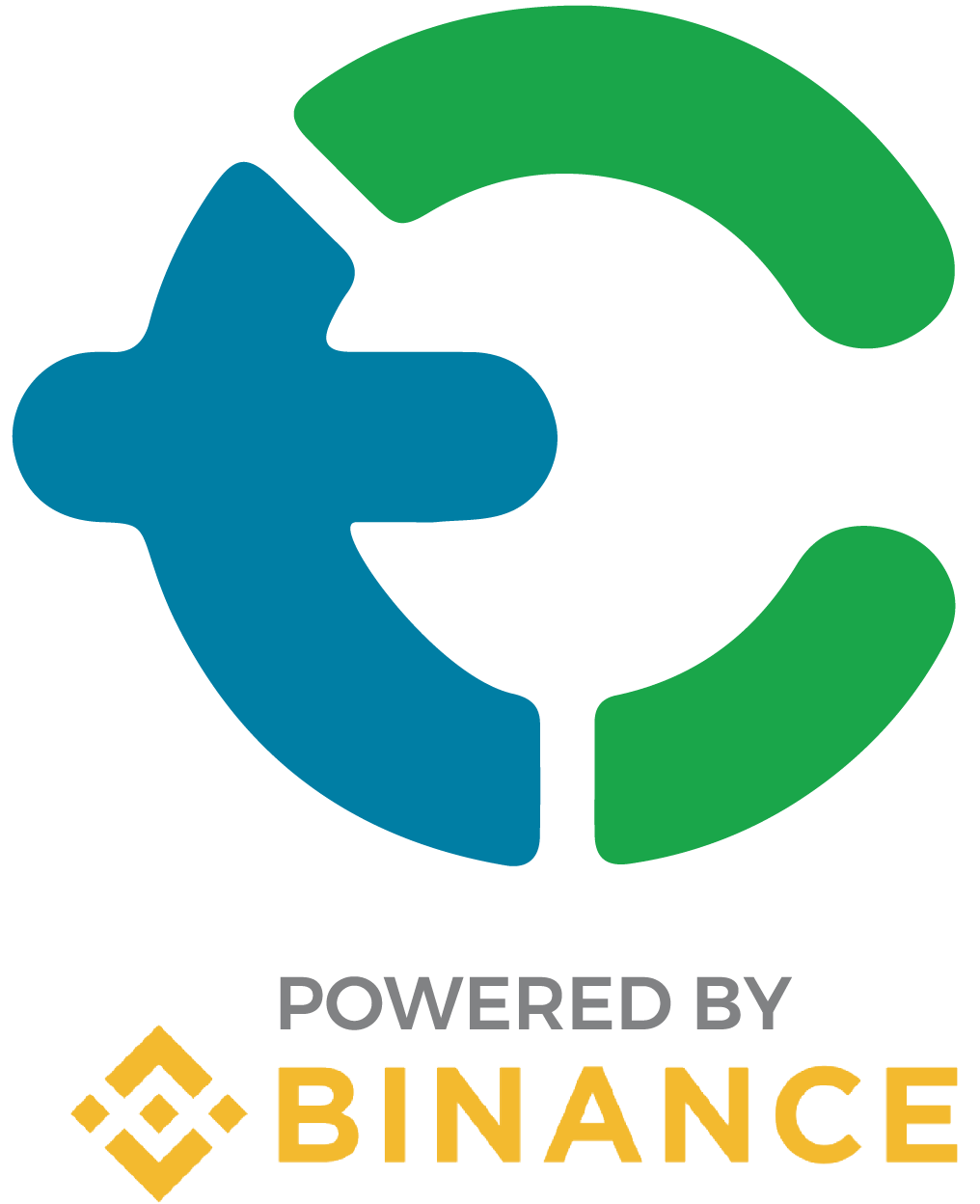 Logo Tokocrypto Digital Exchange (TCDX), sebuah perusahaan yang bergerak dalam bidang perdagangan aset kripto.